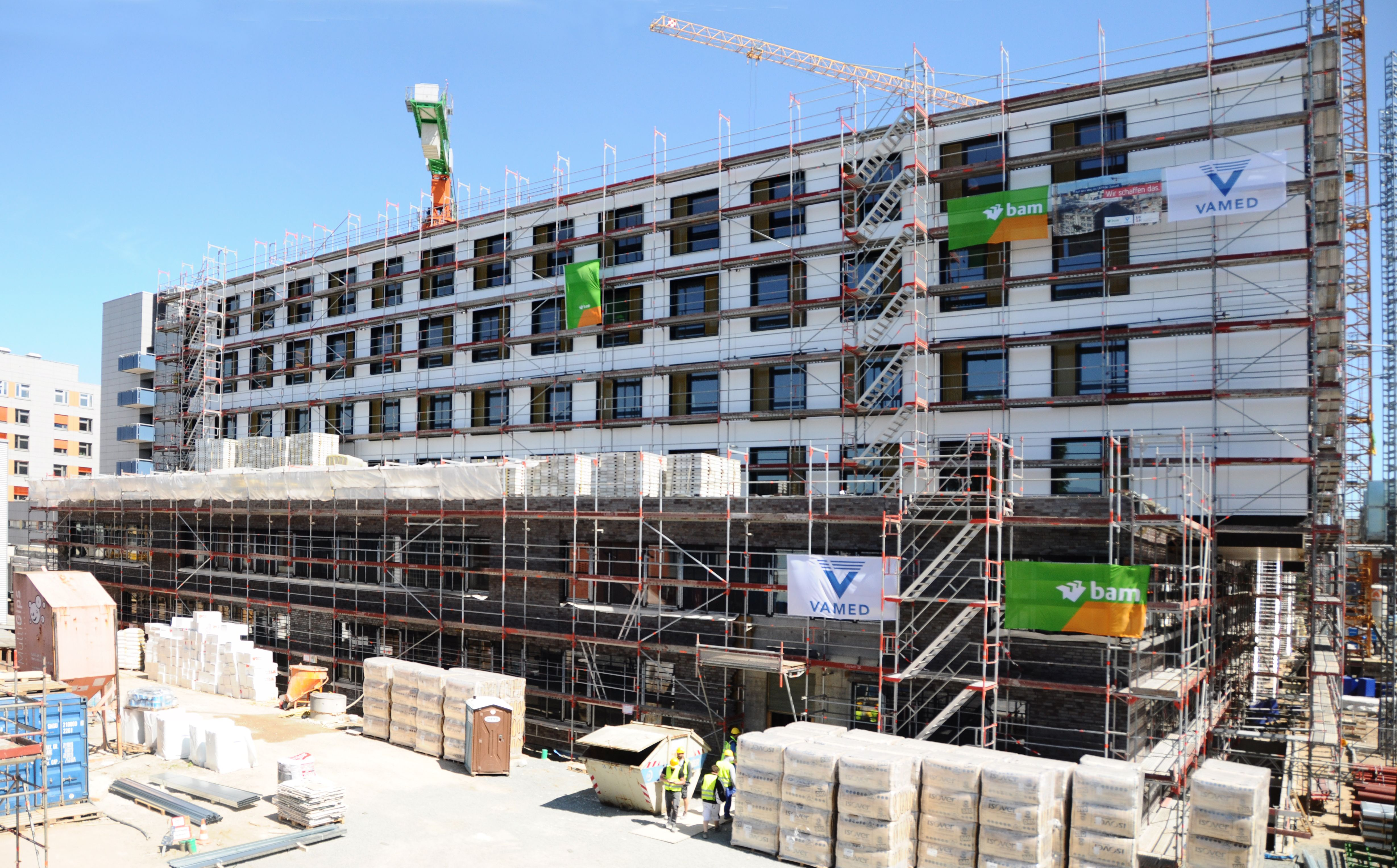 Zentralklinikum / Frontansicht, Campus Kiel